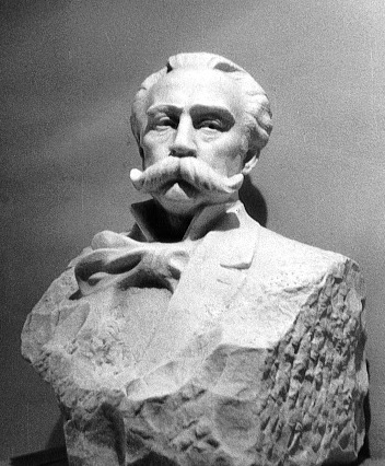 Бюст Тиграна Чухаджяна, Армянский академический театр оперы и балета им. А.А.Спендиарова, мрамор, Ереван, 1971, скульптор А.Шагинян